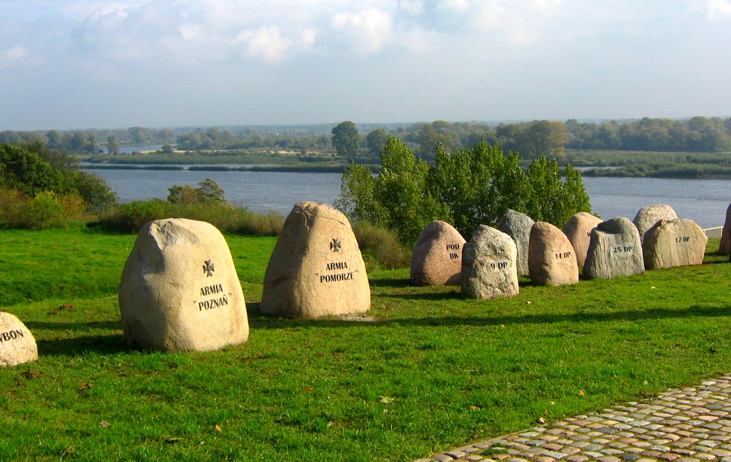 Usytuowane na prawym brzegu Wisły granitowe kamienie z nazwami armii, dywizji i mniejszych jednostek, które brały udział w Bitwie nad Bzurą. Naprzeciw pomnika znajduje się mapa z rozmieszczeniem oddziałów przed bitwą i w jej trakcie.